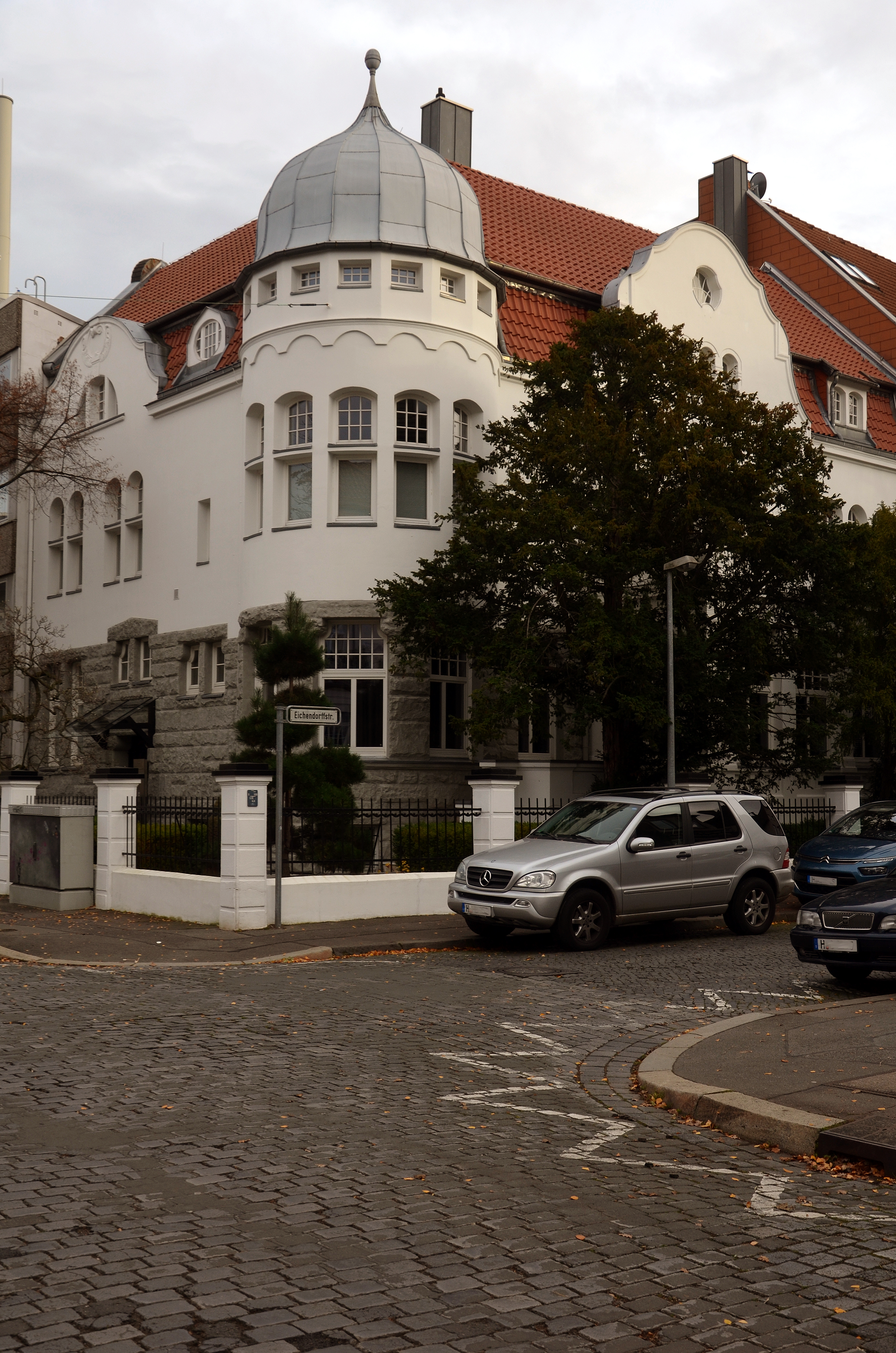 Die 1907 für den Bankier Hermann Gumpel von dem Architekten Wilhelm Mackensen errichtete Villa (unter der damaligen Adresse Eichendorffstraße 14 und heutigen) Adresse Seelhorstraße 22 Ecke Eichendorffstraße in Hannover, Stadtteil Zoo (Hindenburgviertel) ...